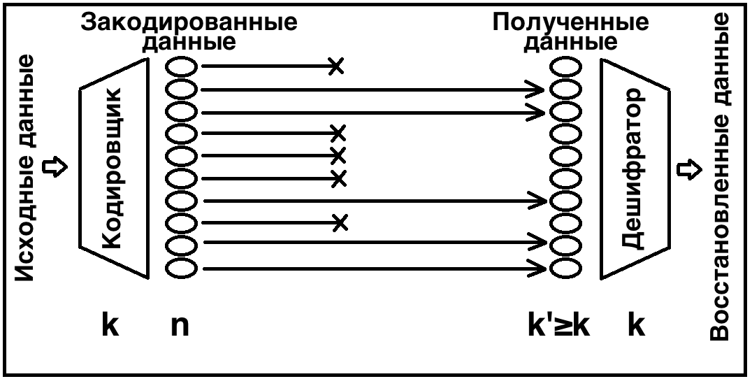 Графическое представление процессов кодирования и декодирования